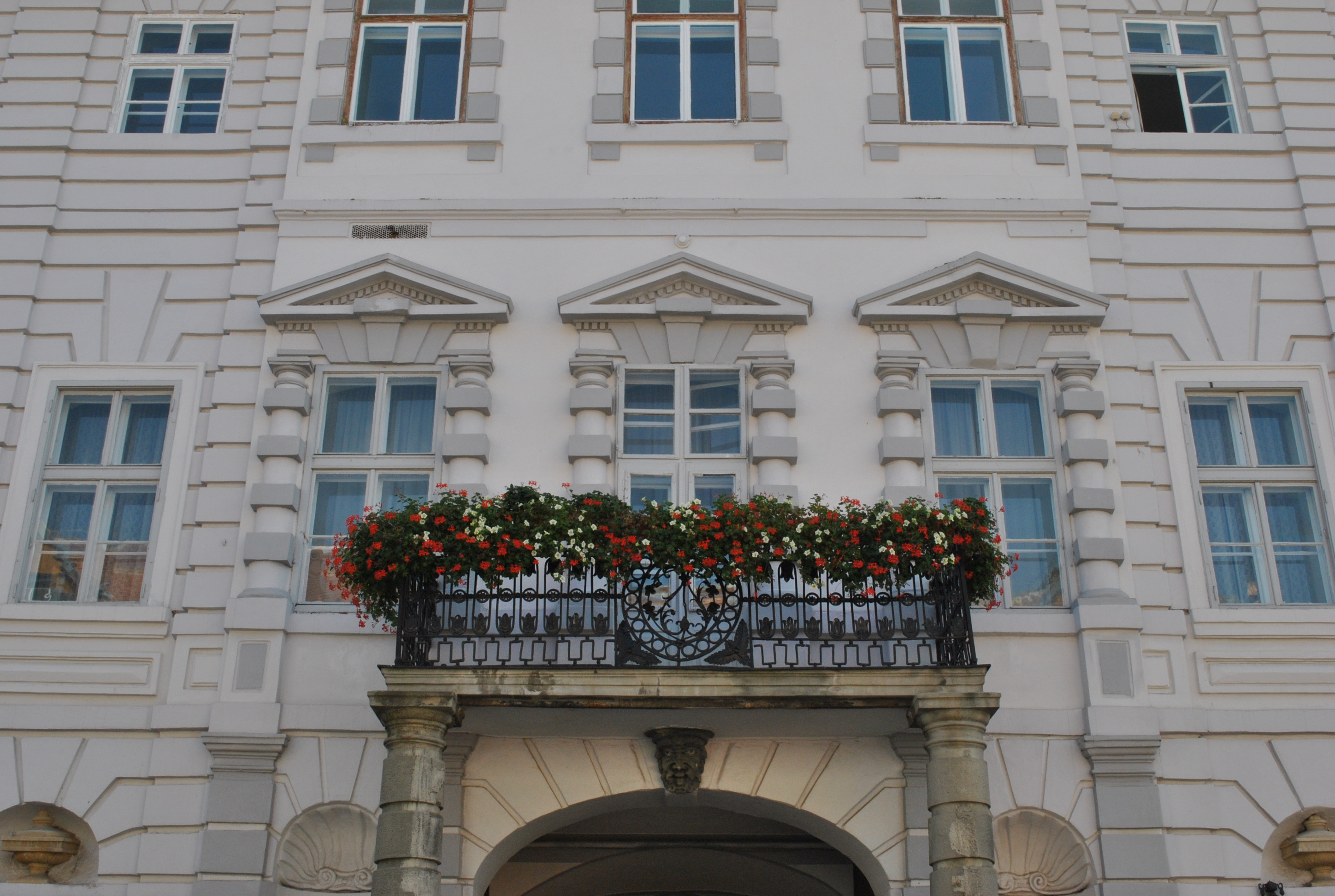 Casa Filek, azi sediul Consistoriului Superior al Bisericii Evanghelice C. A. din România, 1802